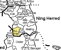 Kort der viser Astrup Sogn, Ning Herred, Århus Amt, Denmark.